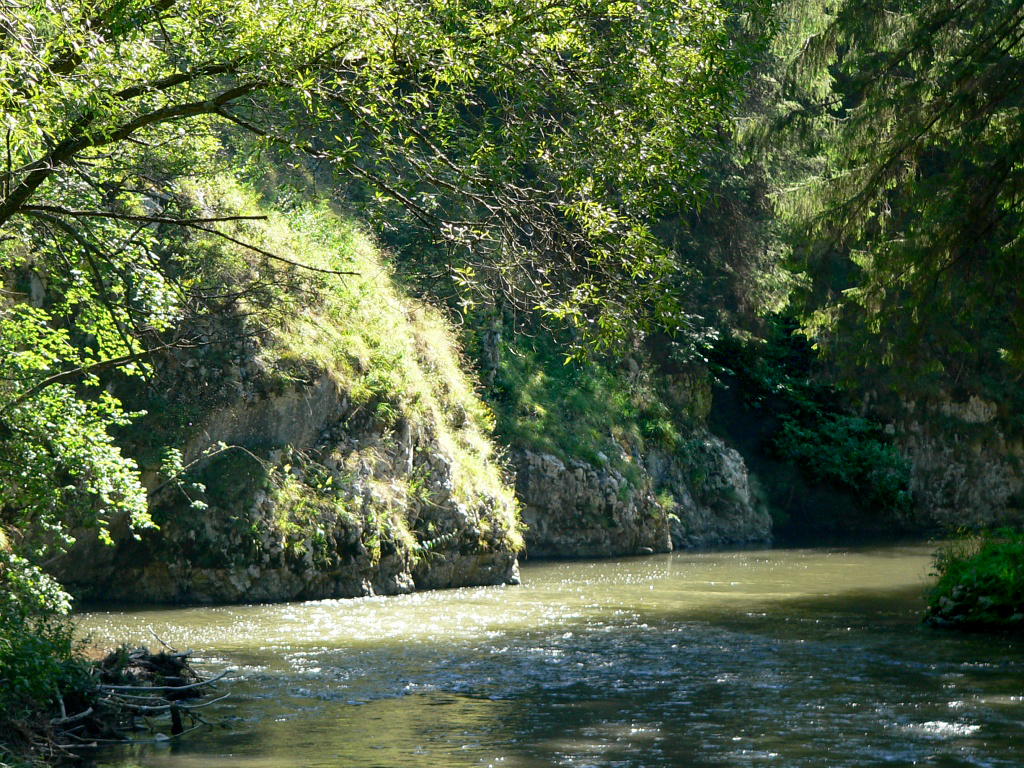 Hornád gorge in Slovak Paradise